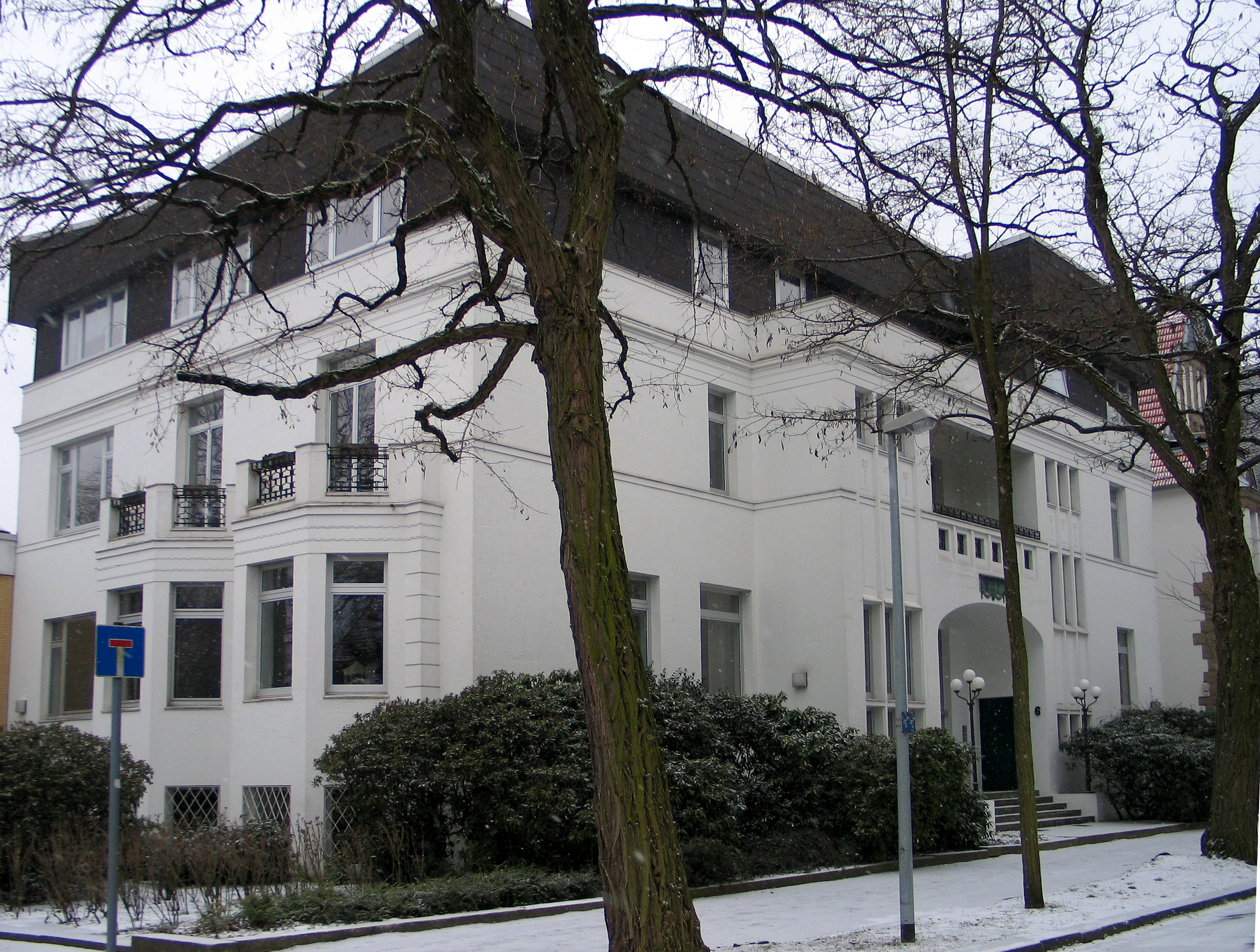 Blick Anfang 2013 von der Ecke Ludwig-Barnay-Straße auf die denkmalgeschützte Hindenburg-Villa, Bristoler Straße 6, im Zoo- oder auch "Hindenburg-Viertel in Hannover ...